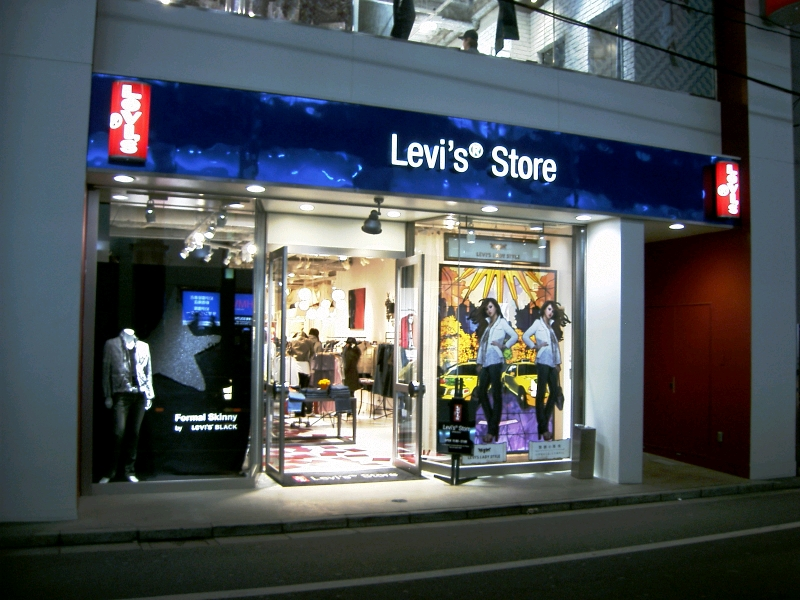 _Levi's_store_Shinjuku Japan